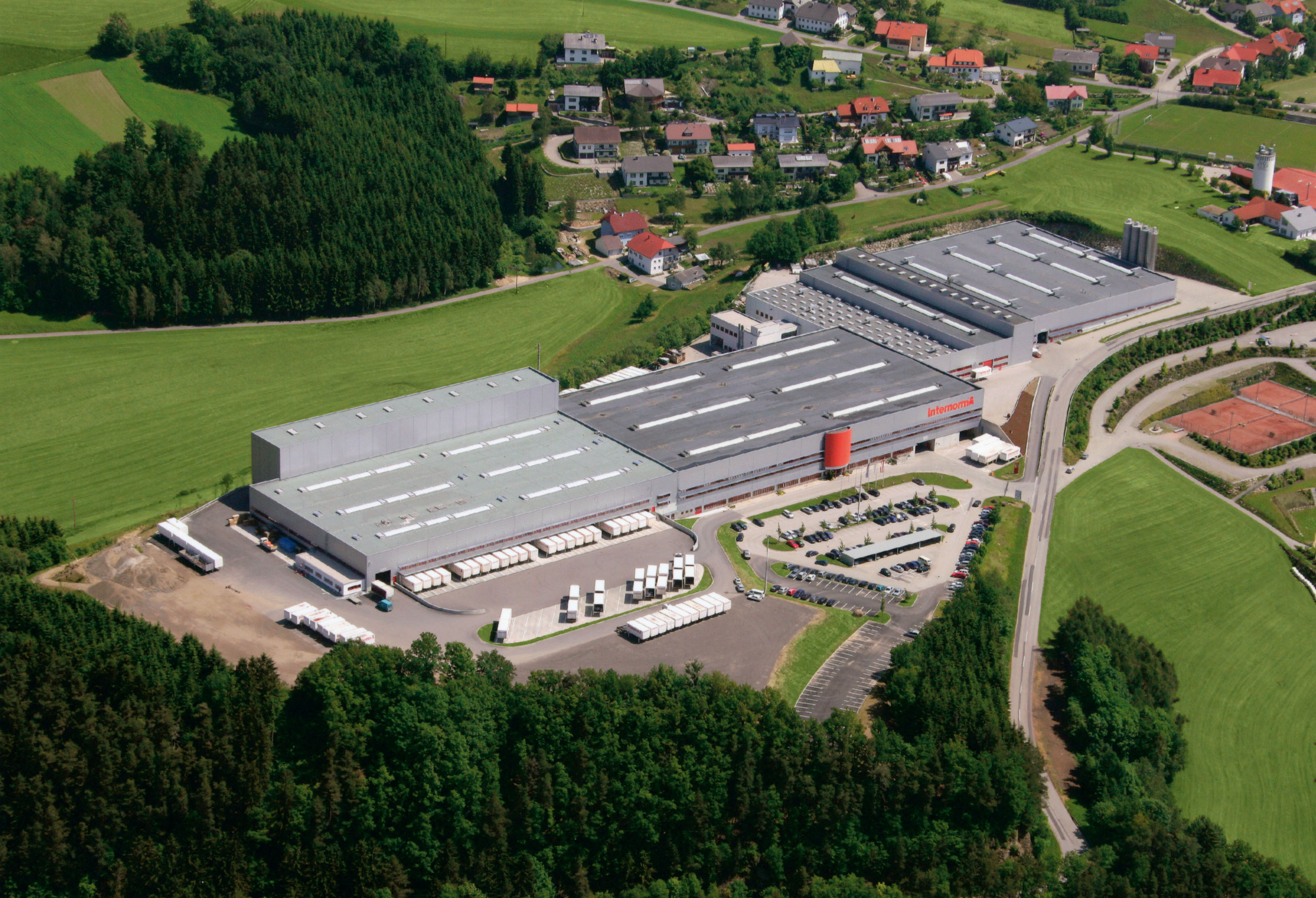 Usine de production de Sarleinsbach